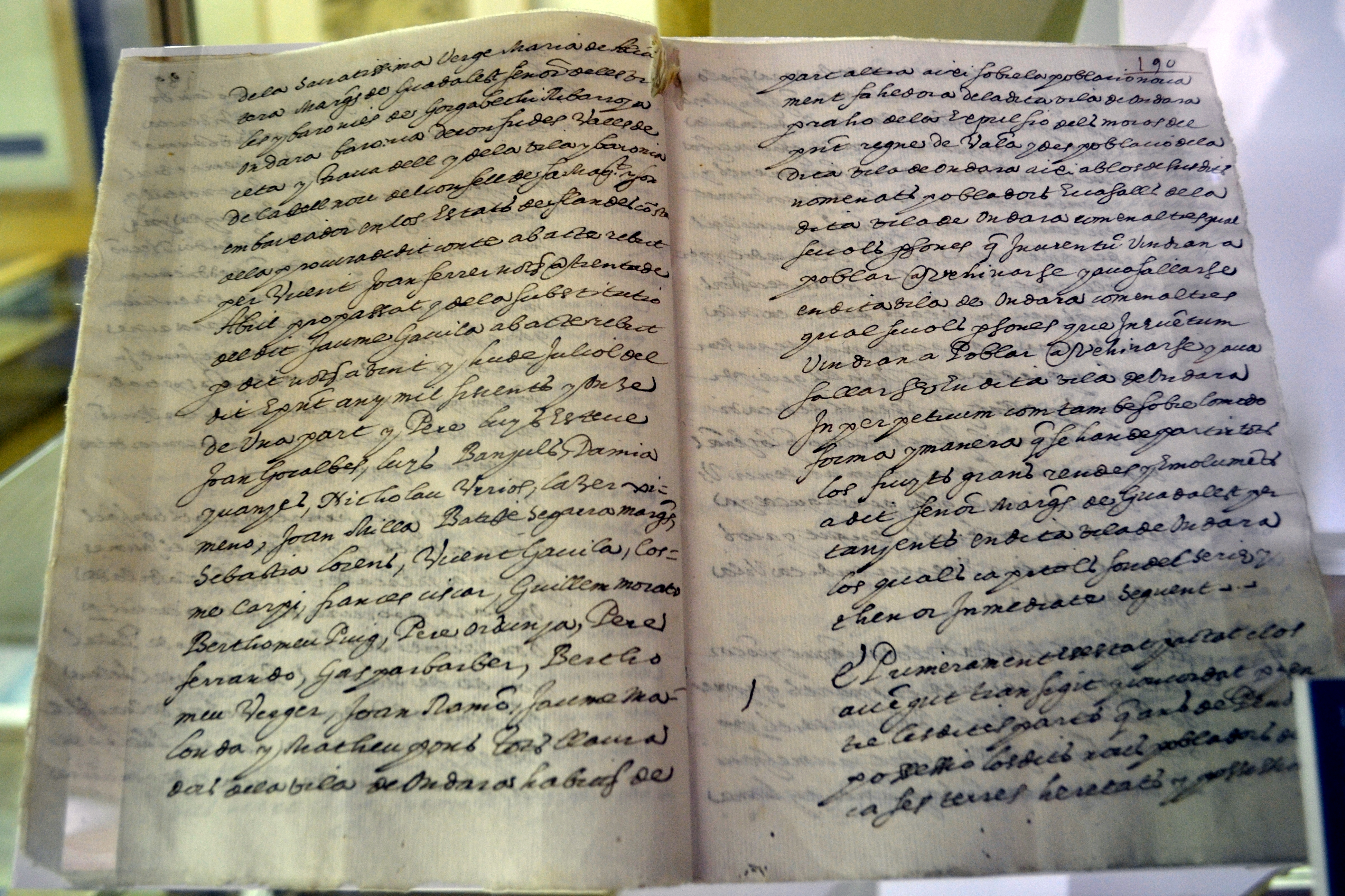 Jaume Gavilà Mercader, procurador de don Sanç Ruiz de Lihori Folch Borja y de Cardona, marqués de Guadalest, concedeix una nova carta pobla a la vila d'Ondara, despoblada per l'expulsió dels moriscos (8 d'agost de 1611). Arxiu del Regne de València. ARVː Reial Audiència , Processos, part 2ª, lletra M, exp. 1333, fol. 187.